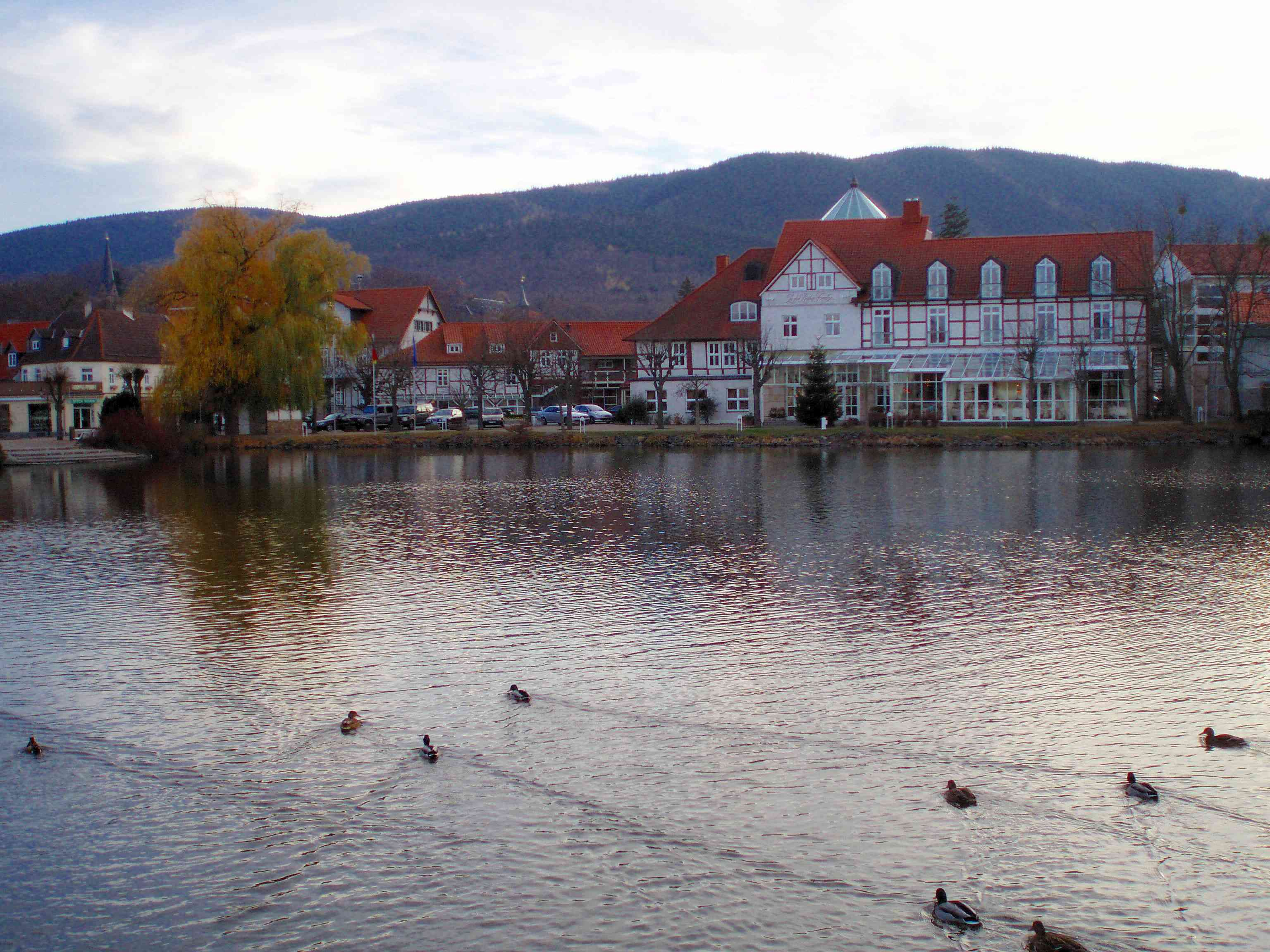 Forellenteich Ilsenburg